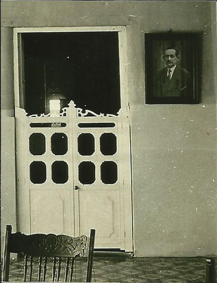 Retrato al óleo de Néstor Luis Pérez en su casa natal de la Calle Carabobo. Maracaibo, Venezuela.